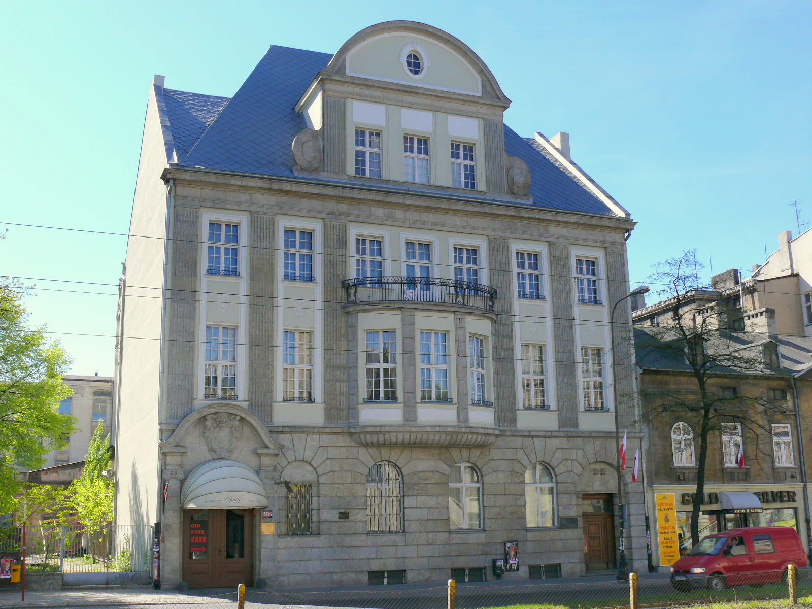 Pałac Wilhelma Lurkensa przy al. Kościuszki 33 w Łodzi